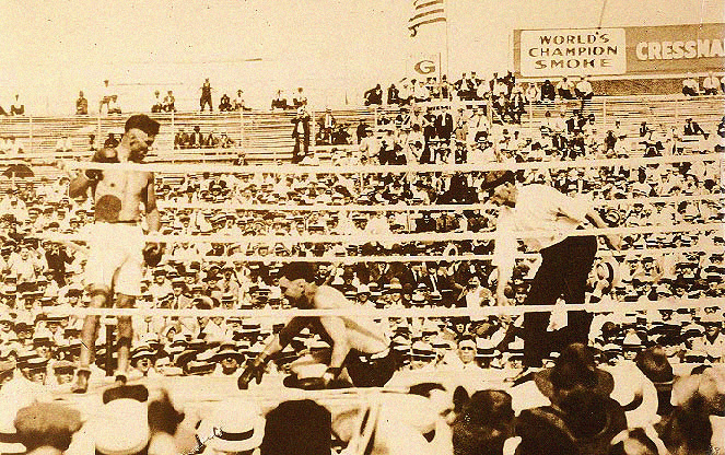 "The Solar Plexus Punch" Jack Dempsey vs. Jess Willard, 4. juli 1919